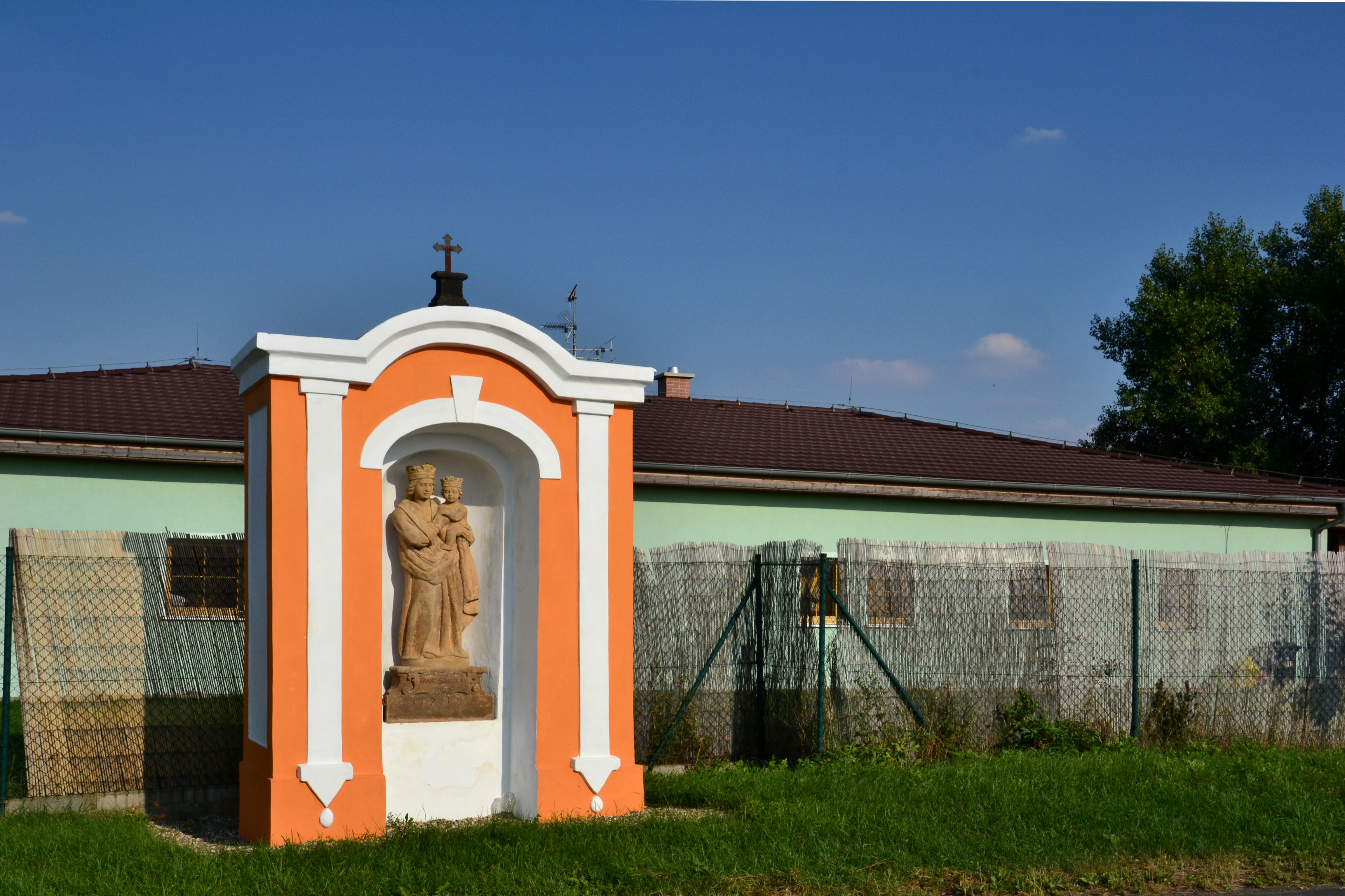 Výklenková kaplička P. Marie (Chbany), S okraj obce, Chbany